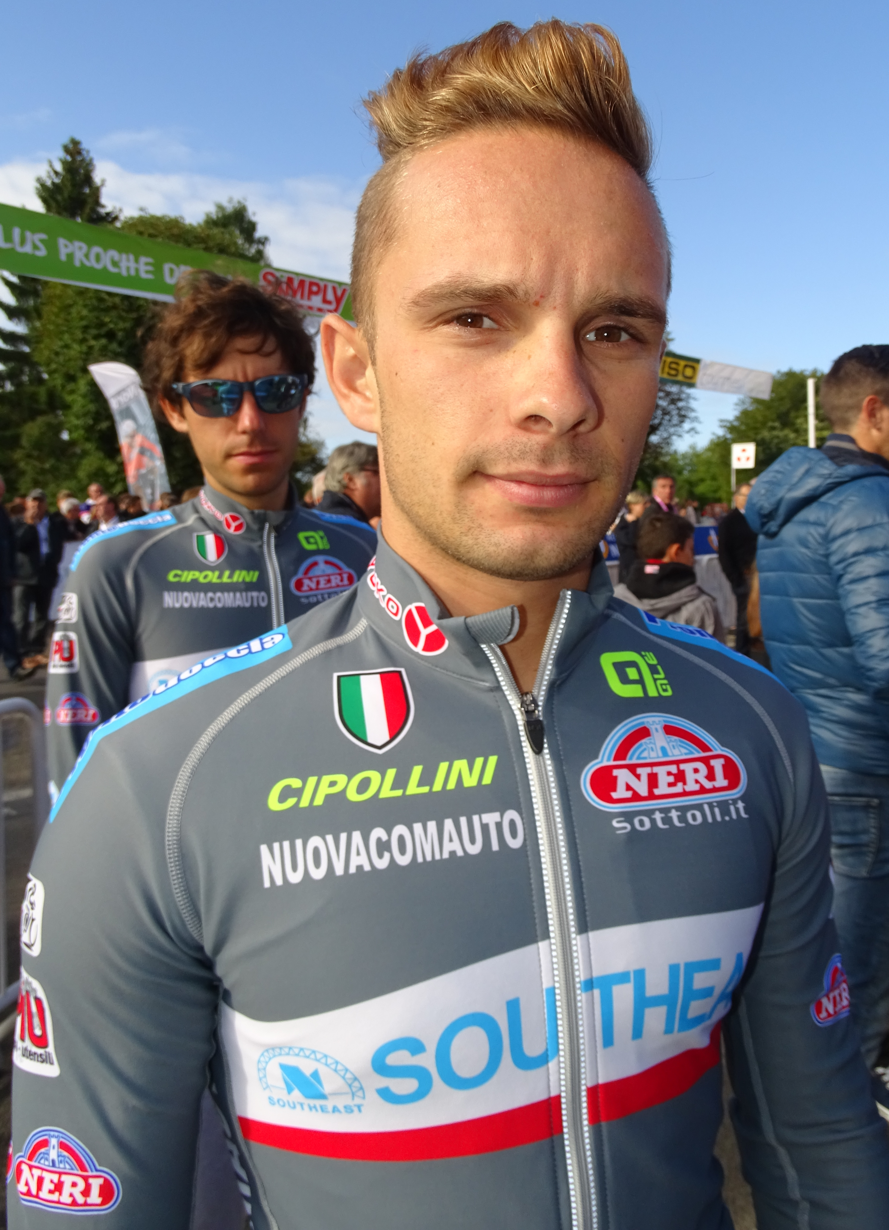 Reportage réalisé le dimanche 6 septembre à l'occasion du départ et de l'arrivée du Grand Prix de Fourmies 2015 à Fourmies, Nord-Pas-de-Calais, France.